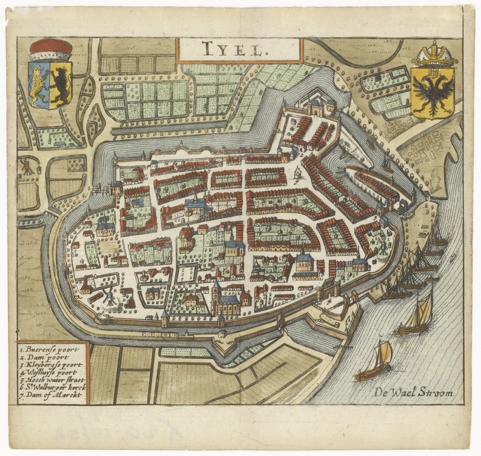 Ingekleurde kopergravure van een plattegrond van de Tielse binnenstad met een legenda van de belangrijke gebouwen en enkele straten. Boven de wapens van Gelre en van Tiel. De volgende locaties worden genoemd: de Burense Poort, de Dam Poort, de Kleibergse Poort, de Westluidense Poort, de Hoog Waterstraat, de Sint-Walburgkerk en de Dam of Markt. Uit Belgicae, sive Inferioris Germaniae, Descriptio editio postrema additamentis novis & Statu Politico regionum & urbium aucta van Guilielmum Blaeu.